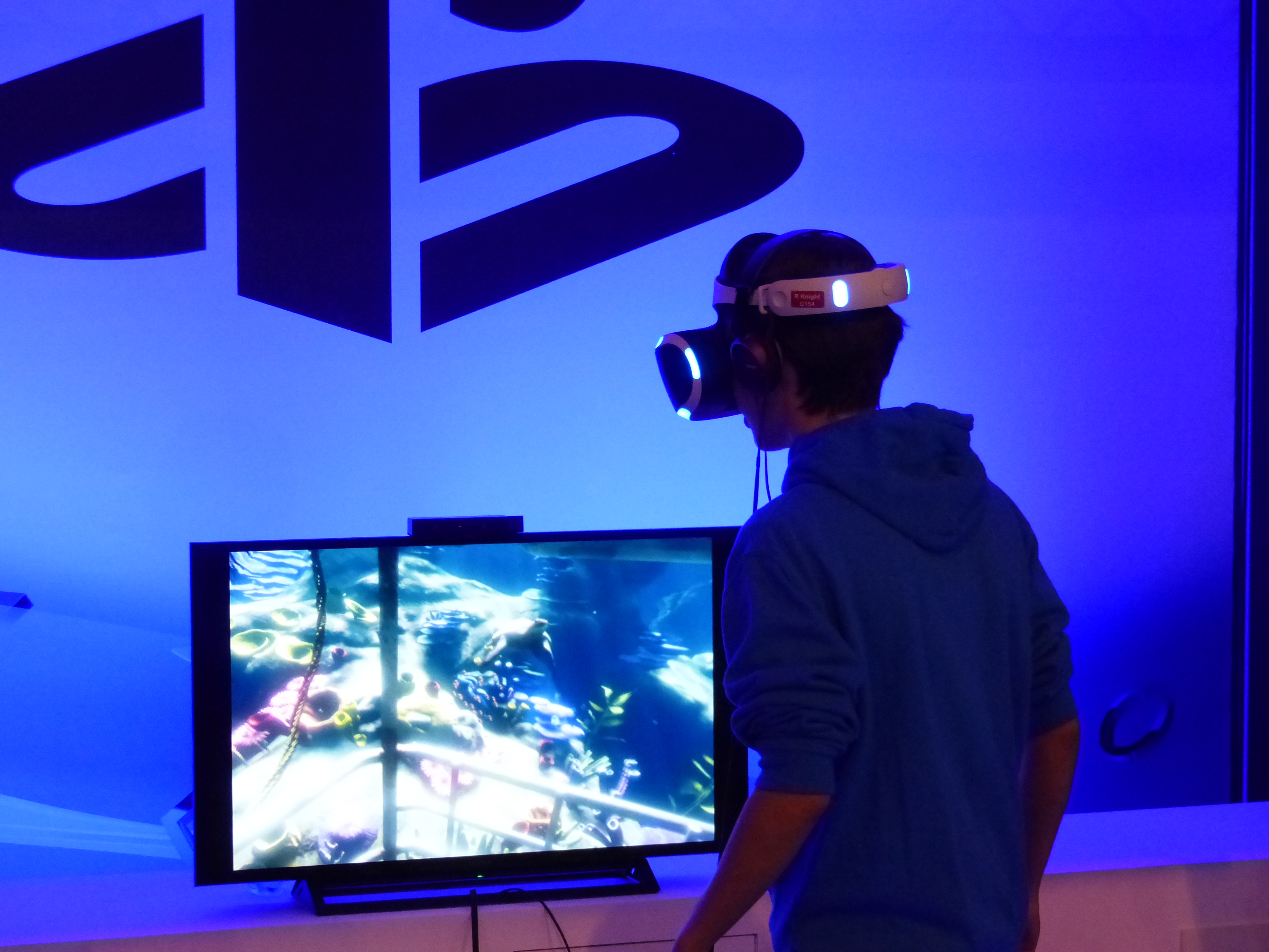 Madrid Games Week, PlayStation VR, usuario.